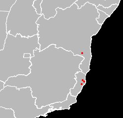 mapa dos atuais locais de coletas de Inga hispida